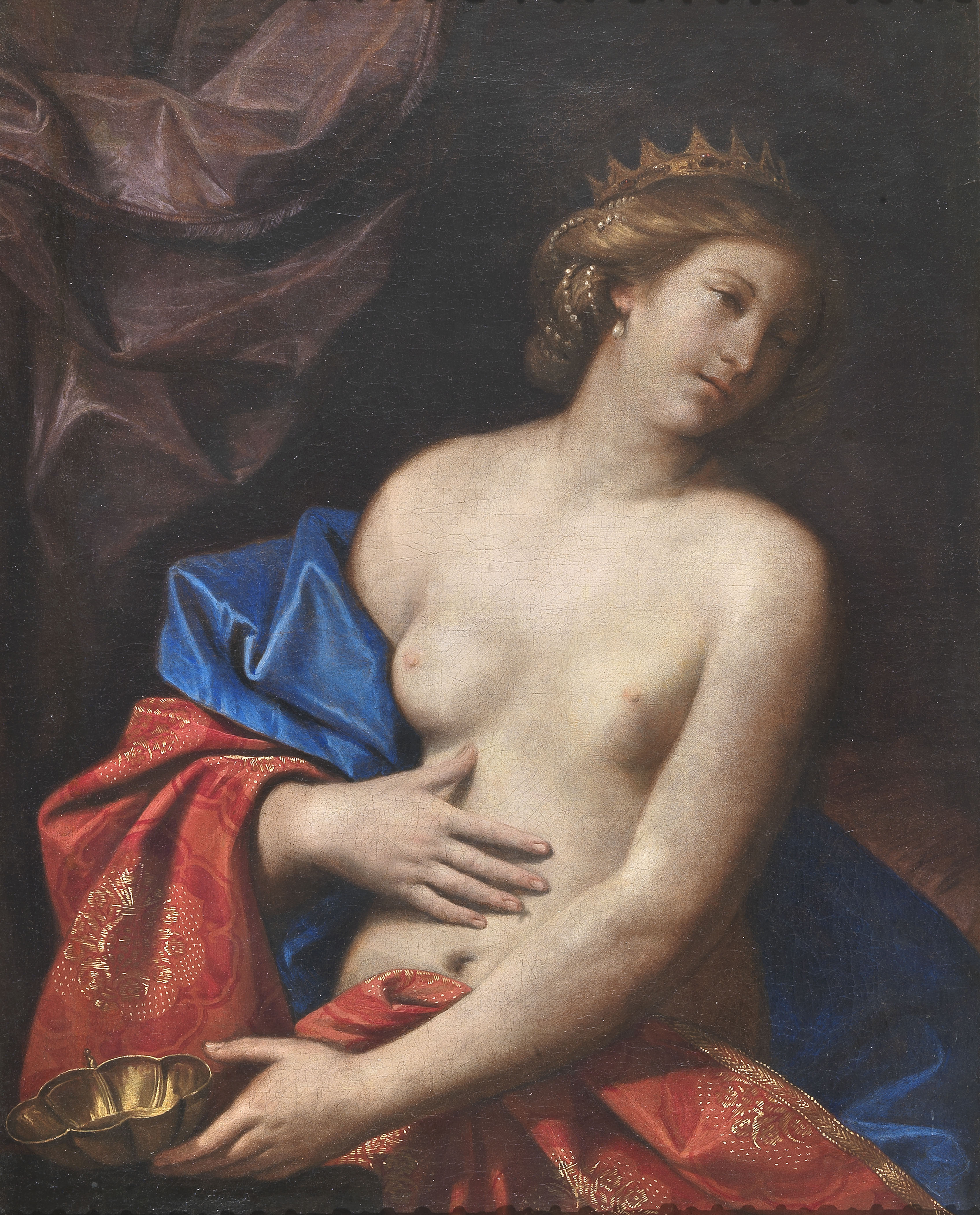 Sofonisba nuda morente Olio su tela 97 x 79 cm Collezione M, (Collezione privata)